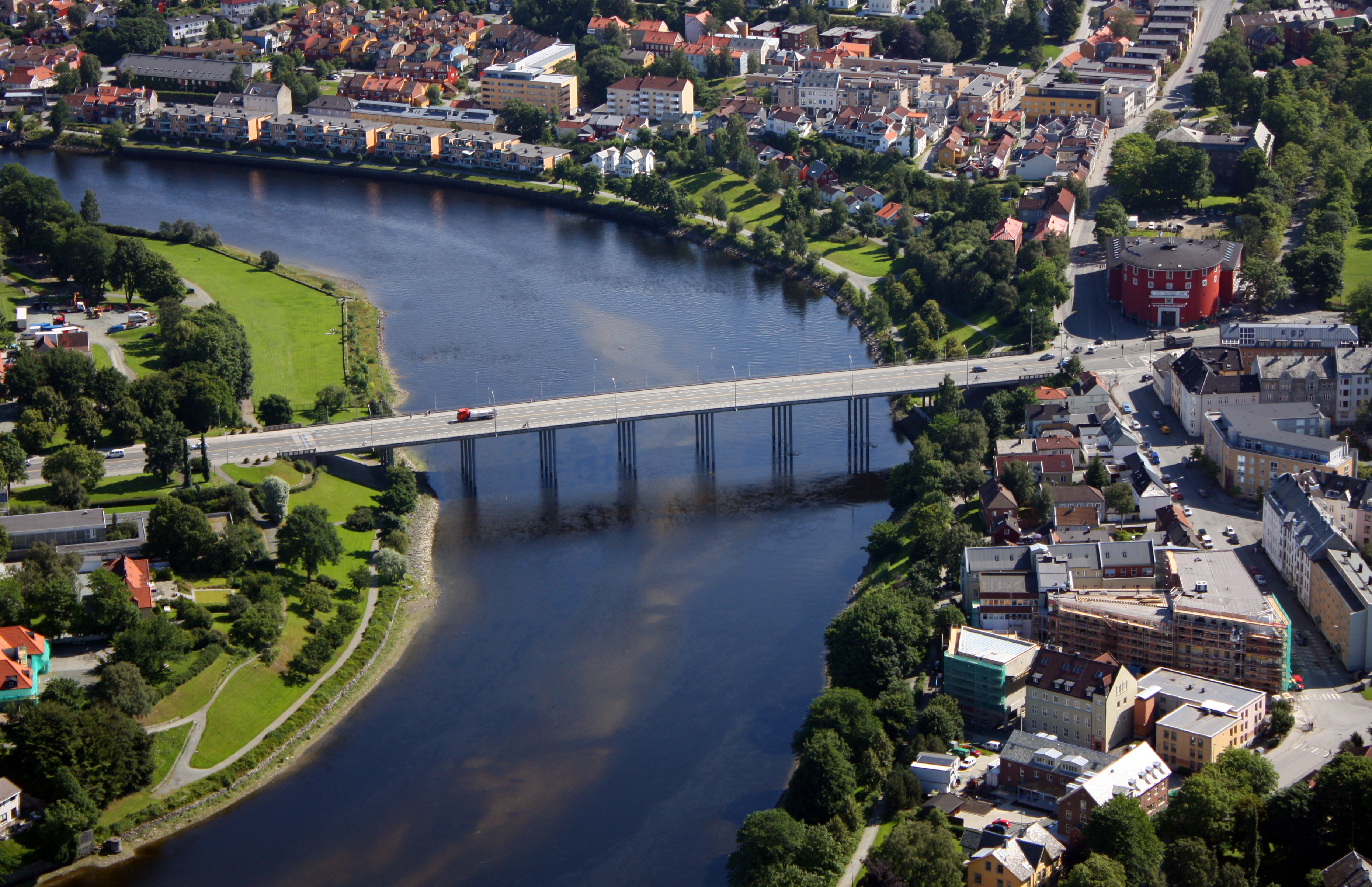 Elgeseter bru